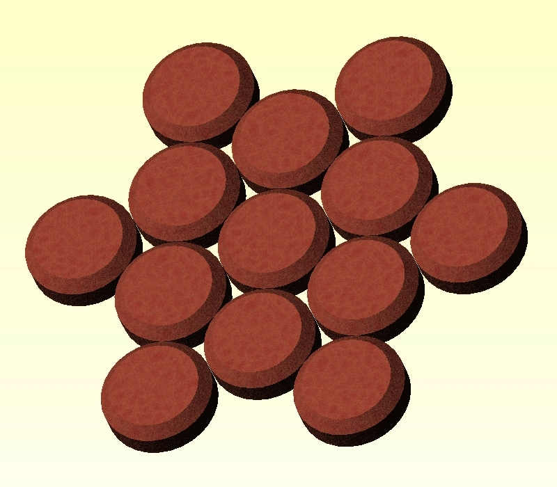 illustration du nombre étoilé 13. réalisation avec SolidWorks et son moteur de rendu.